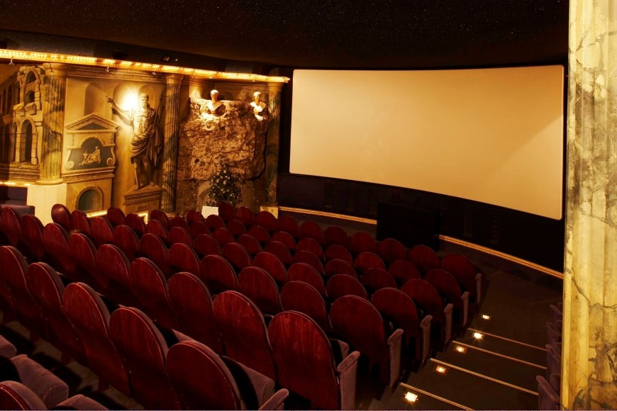 Römersaal (136 Sitzplätze) des Mozartkino Salzburg mit Überresten historischer Römermauern